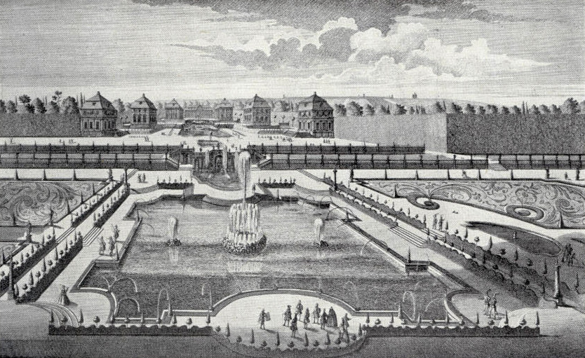 "Perspectivischer Auffzug einiger Stücken, als die Fontaine Thetis, deß Amphitheatri, der Orangerie und der zwischen 6 Pavillon gelegenen Wasserreichen großen Cascaden, beyde Flüsse den Rhein und Mayn darstellend" - Thetis-Grotte und Wasserspiele in der Favorite nach einem Stich von Salomon Kleiner, 1726